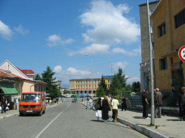 Pamje nga qyteti i Pukes